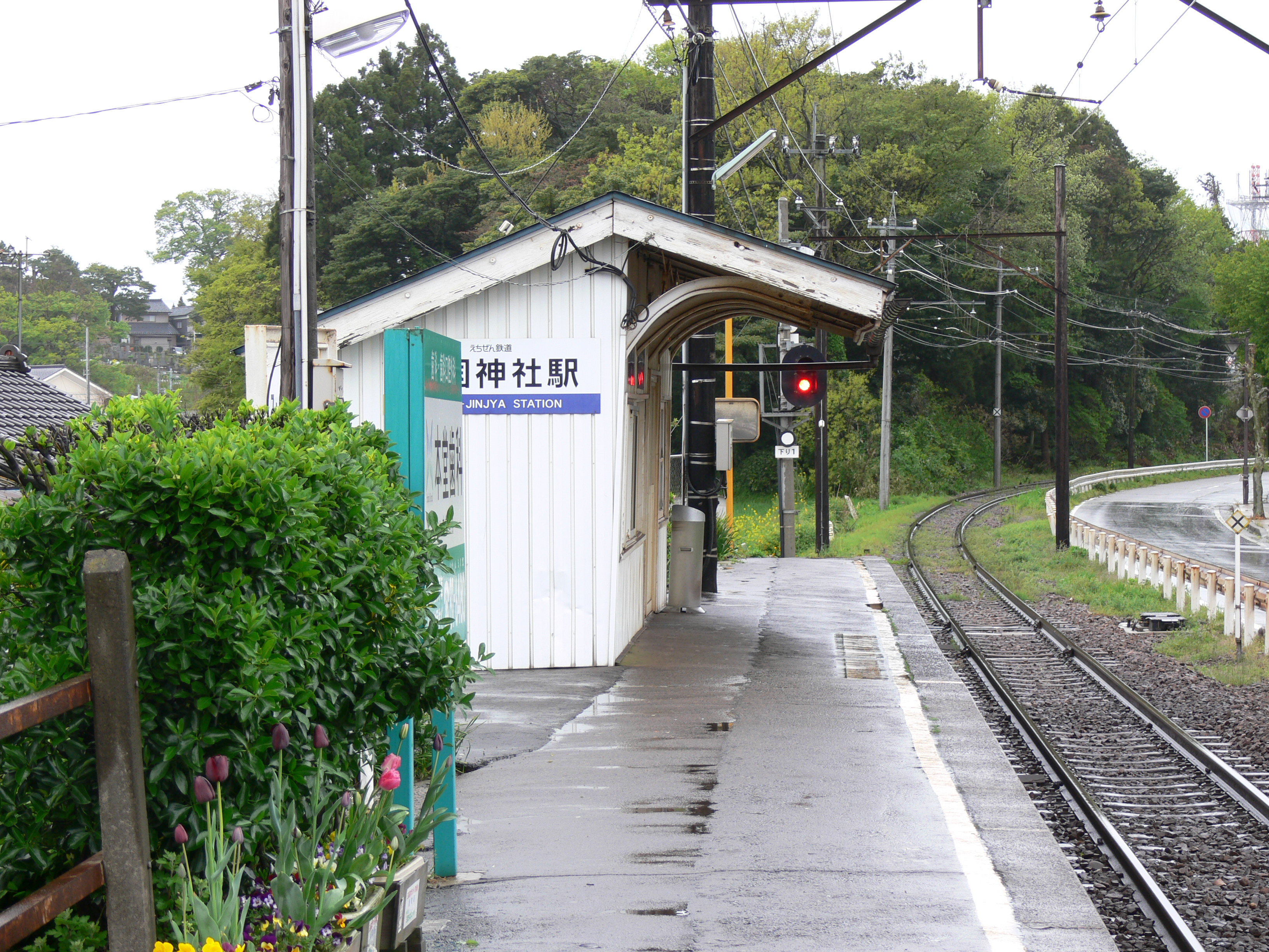 Mikuni Jinja Station